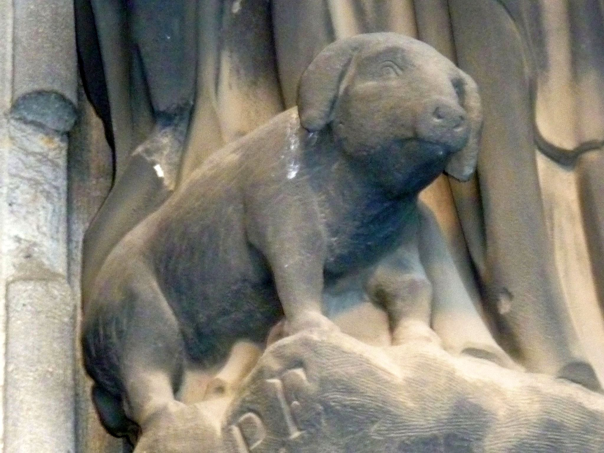 Antoniterschwein zu Füßen des heiligen Antonius, Kölner Dom, Nordportal